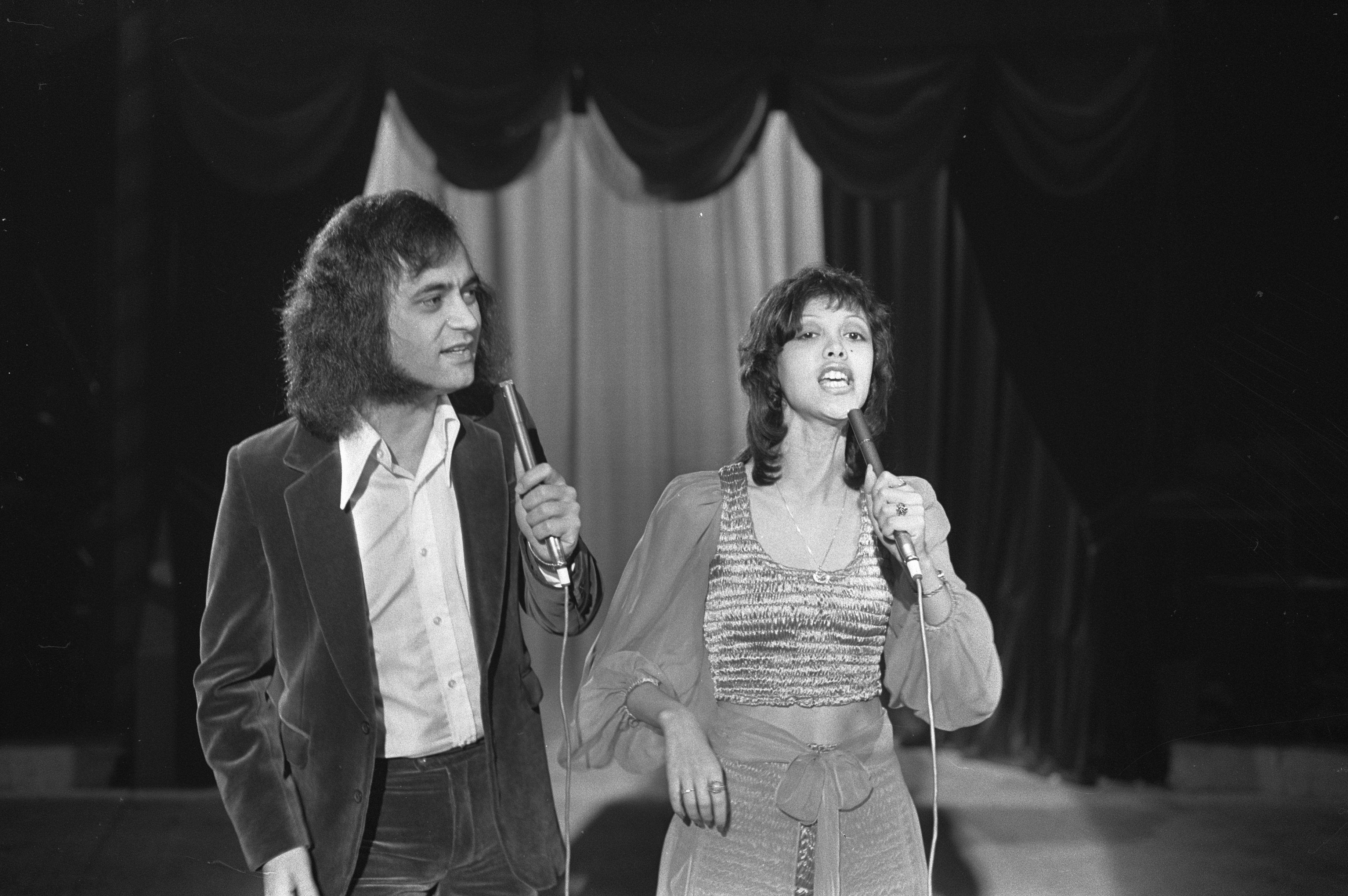 Collectie / Archief : Fotocollectie Anefo Reportage / Serie : [ onbekend ] Beschrijving : Repetitie finale Nationaal Songfestival in Carré, Amsterdam, Sandra en Andres Datum : 16 februari 1972 Locatie : Amsterdam, Noord-Holland Trefwoorden : songfestivals Persoonsnaam : Andres, Reemer, Sandra Instellingsnaam : Nationaal Songfestival Fotograaf : Croes, Rob C. / Anefo, [onbekend] Auteursrechthebbende : Nationaal Archief Materiaalsoort : Negatief (zwart/wit) Nummer archiefinventaris : bekijk toegang 2.24.01.05 Bestanddeelnummer : 925-3899